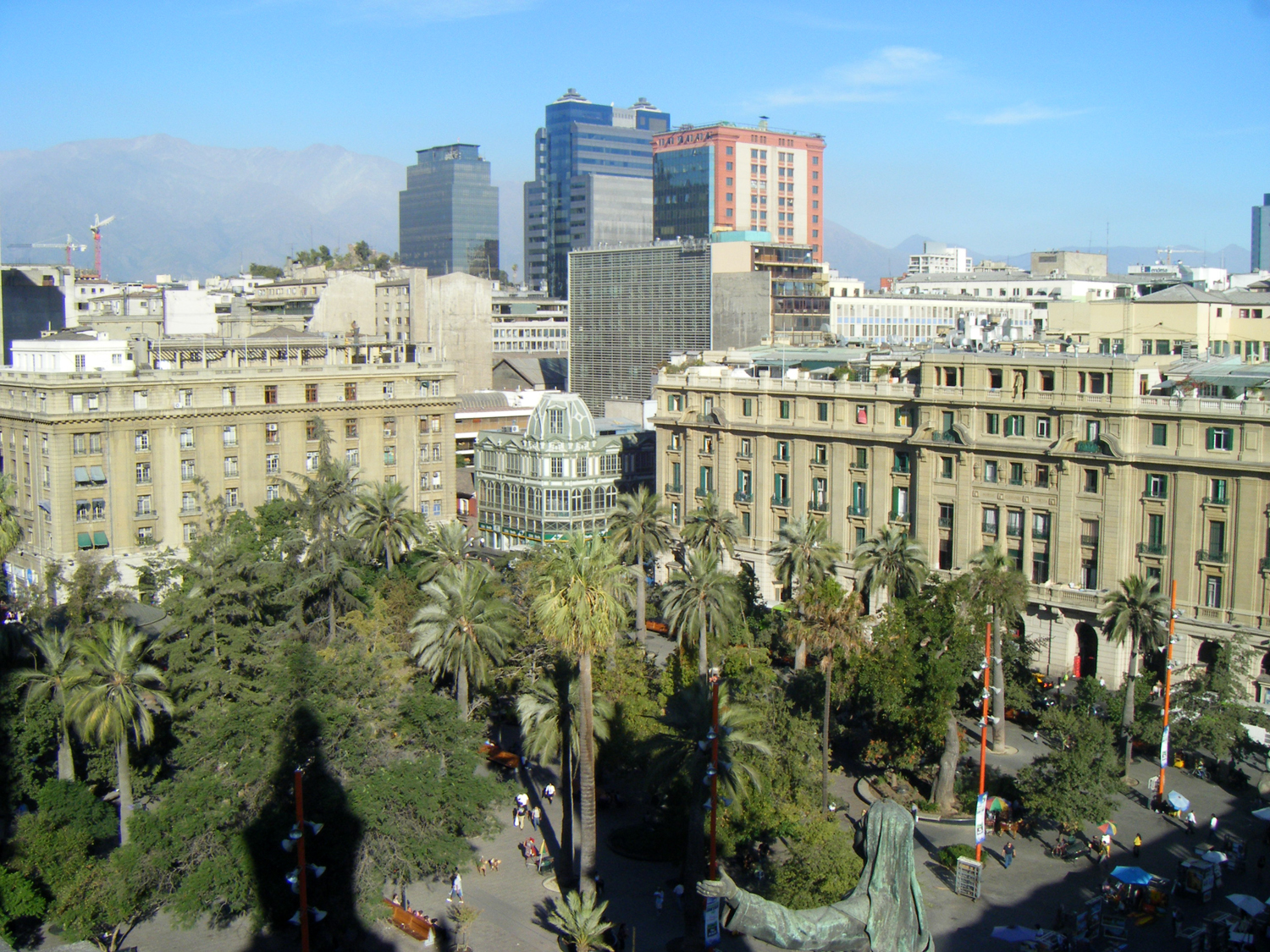 Plaza de Armas. This is a photo of a national monument in Chile: 227